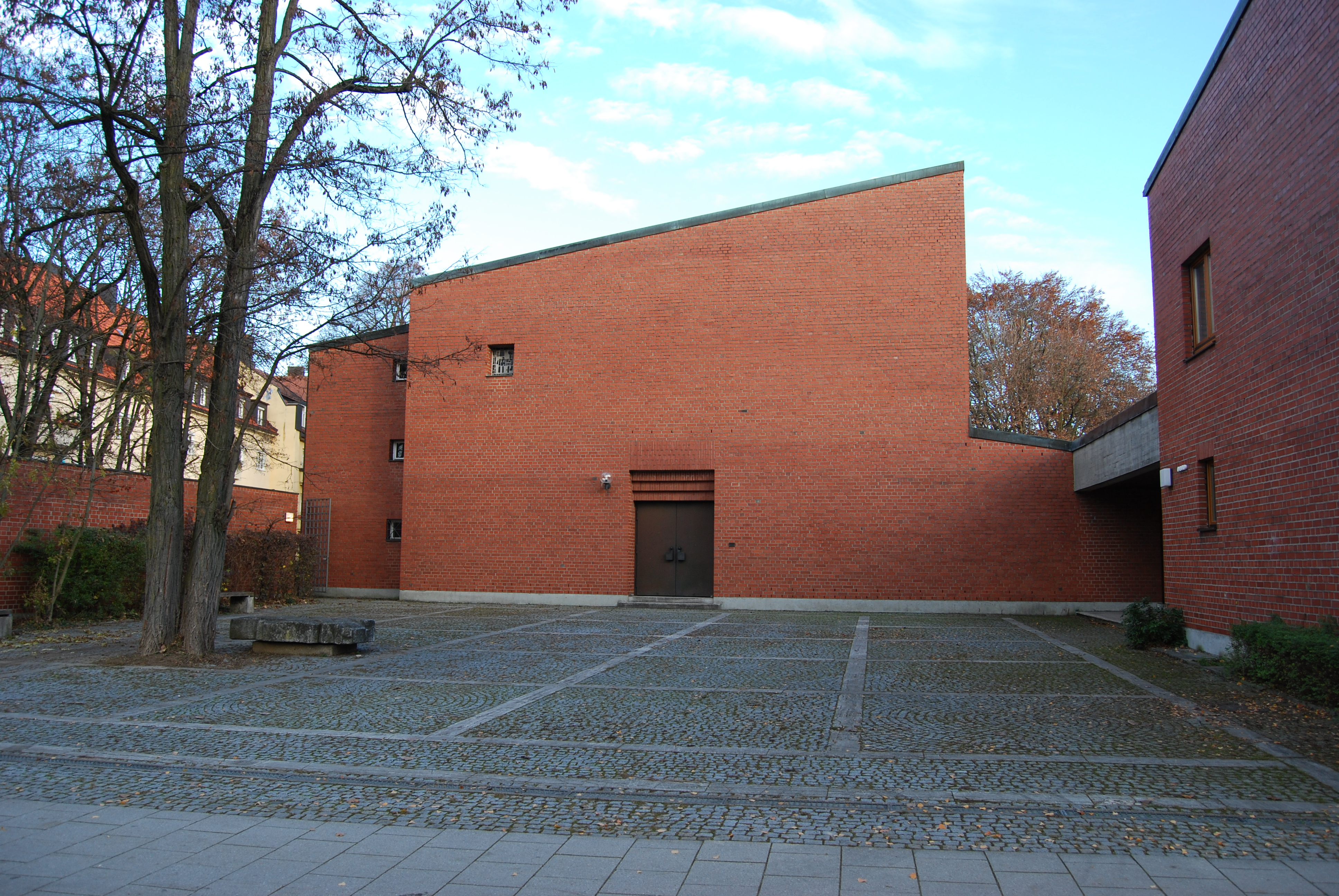 Evangelische Passionskirche München-Thalkirchen; Blick von Westen